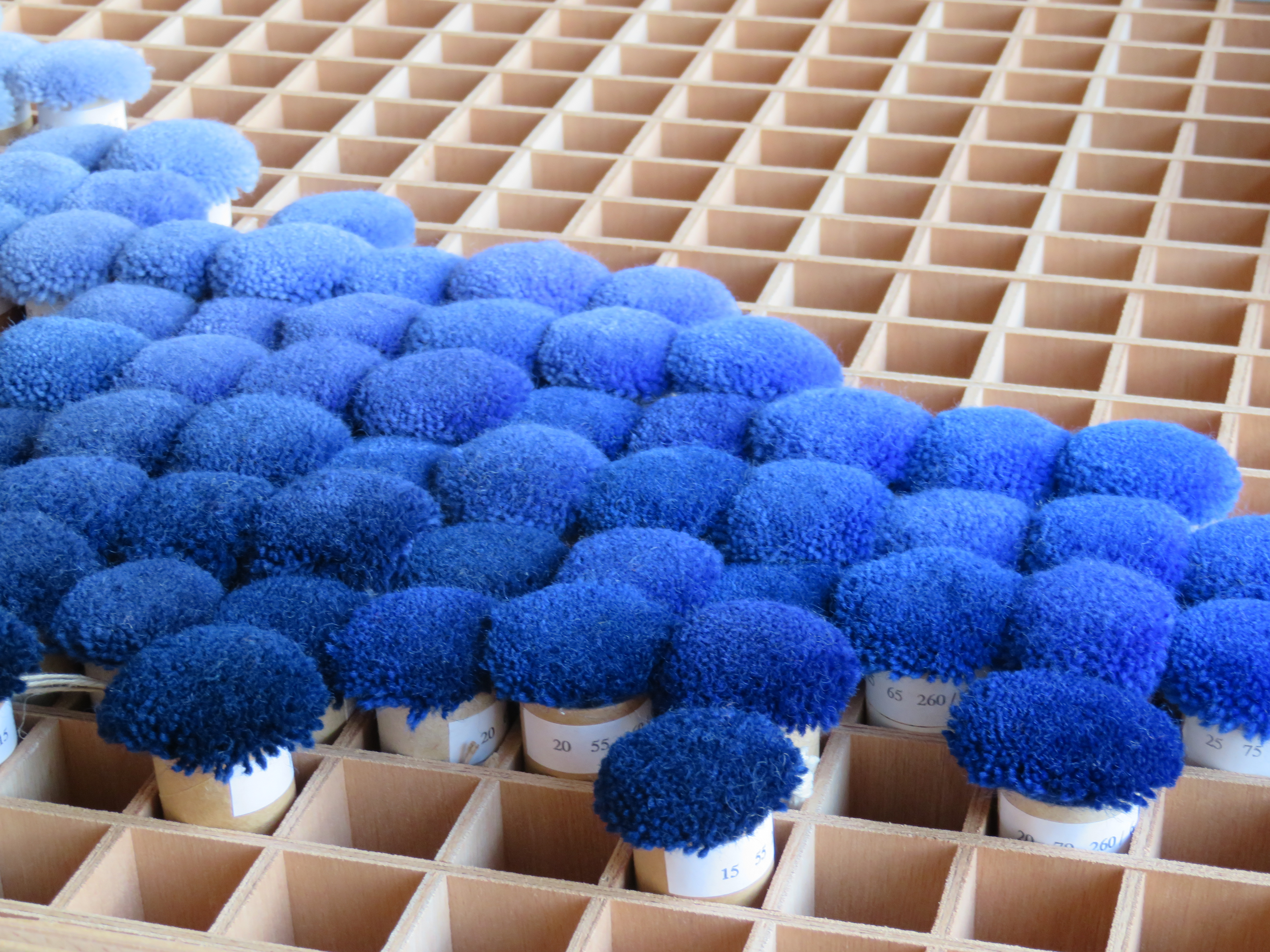 Pompons bleus, nuancier pour la manufacture de la Savonnerie.